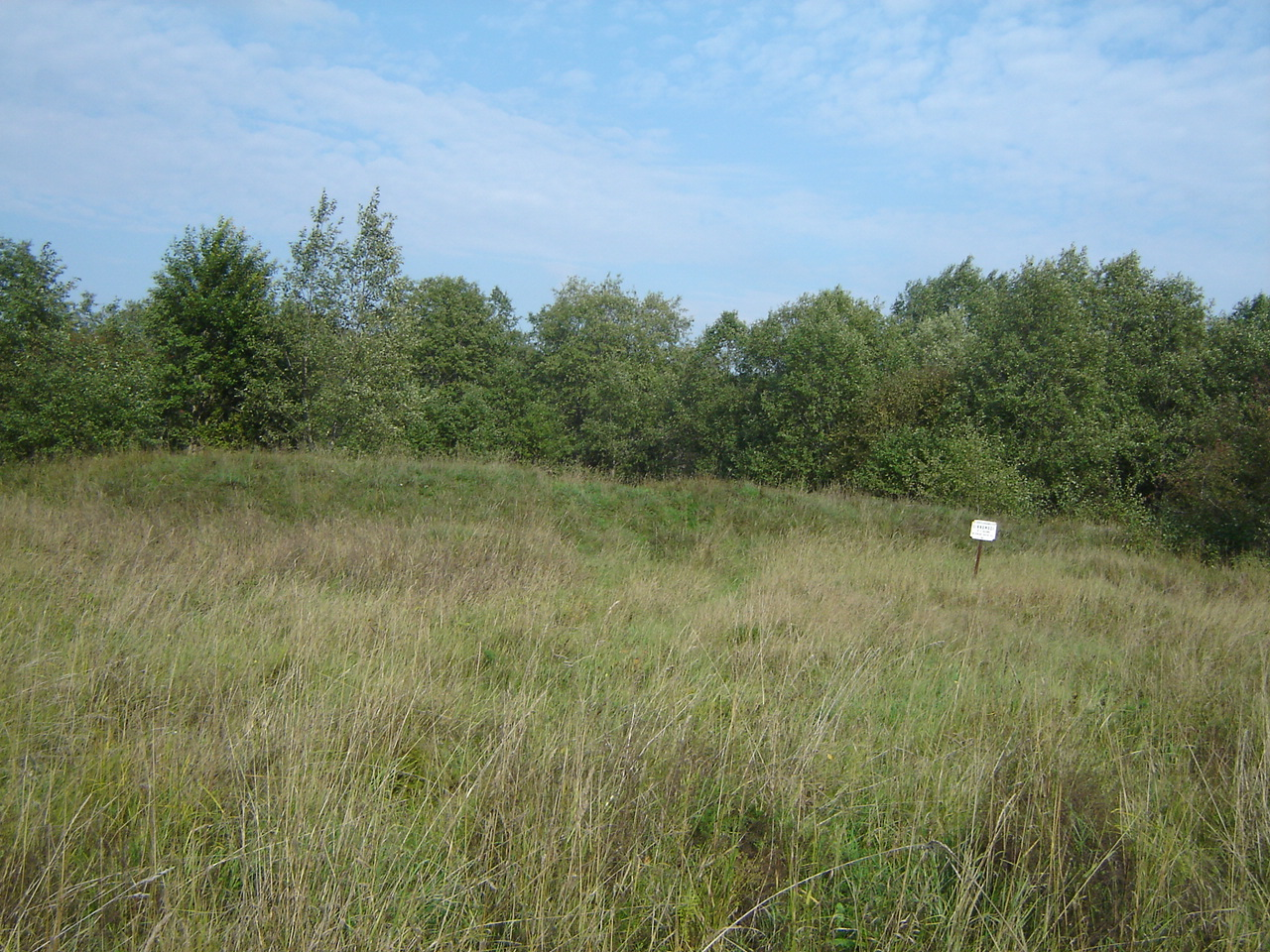 Lohu väiksema linnamäe vall